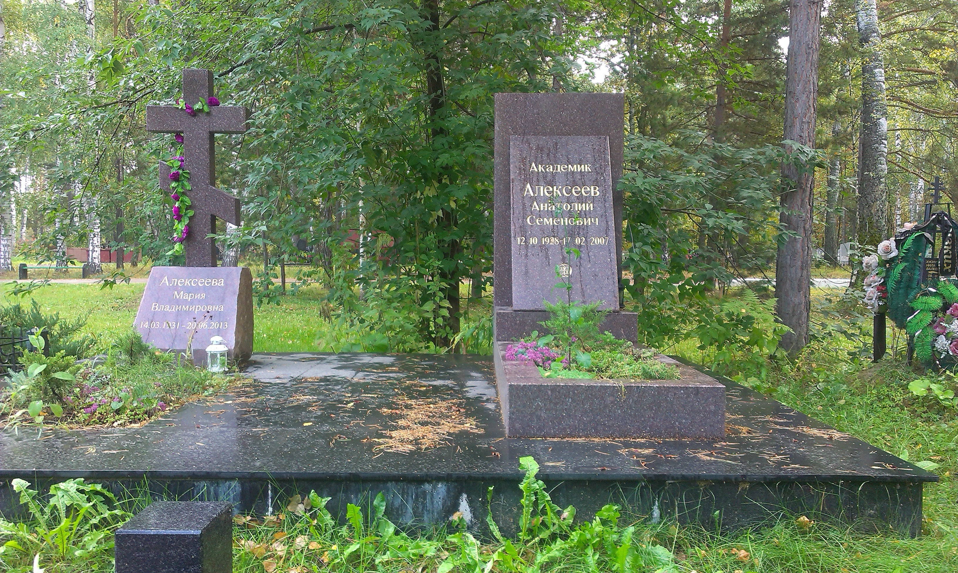 Южное (Чербузинское) кладбище